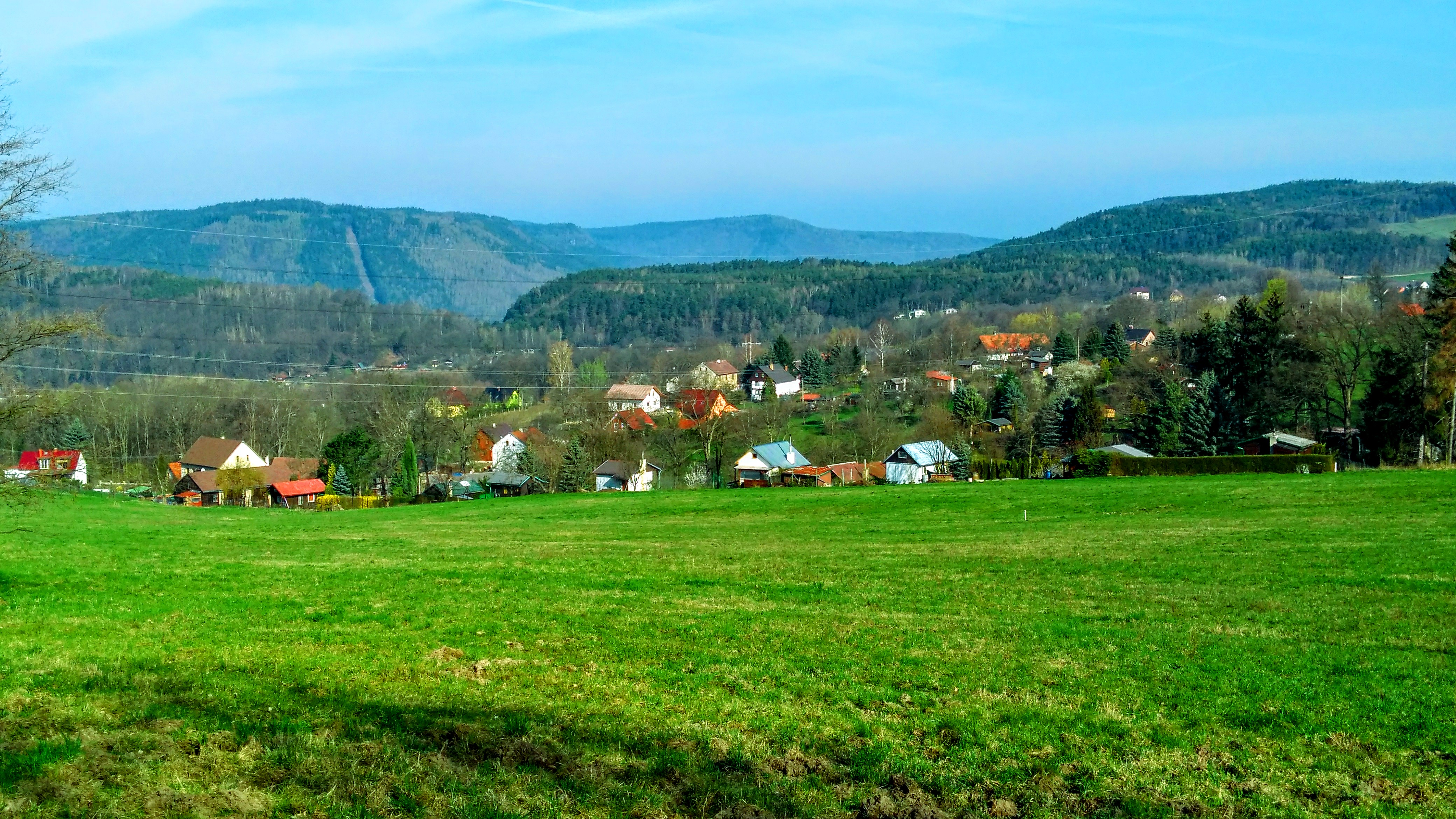 Pohled z jihovýchodu na Folknáře (Děčín).